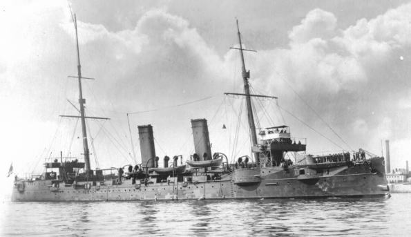 Japanese cruiser Chitose, date uncertain